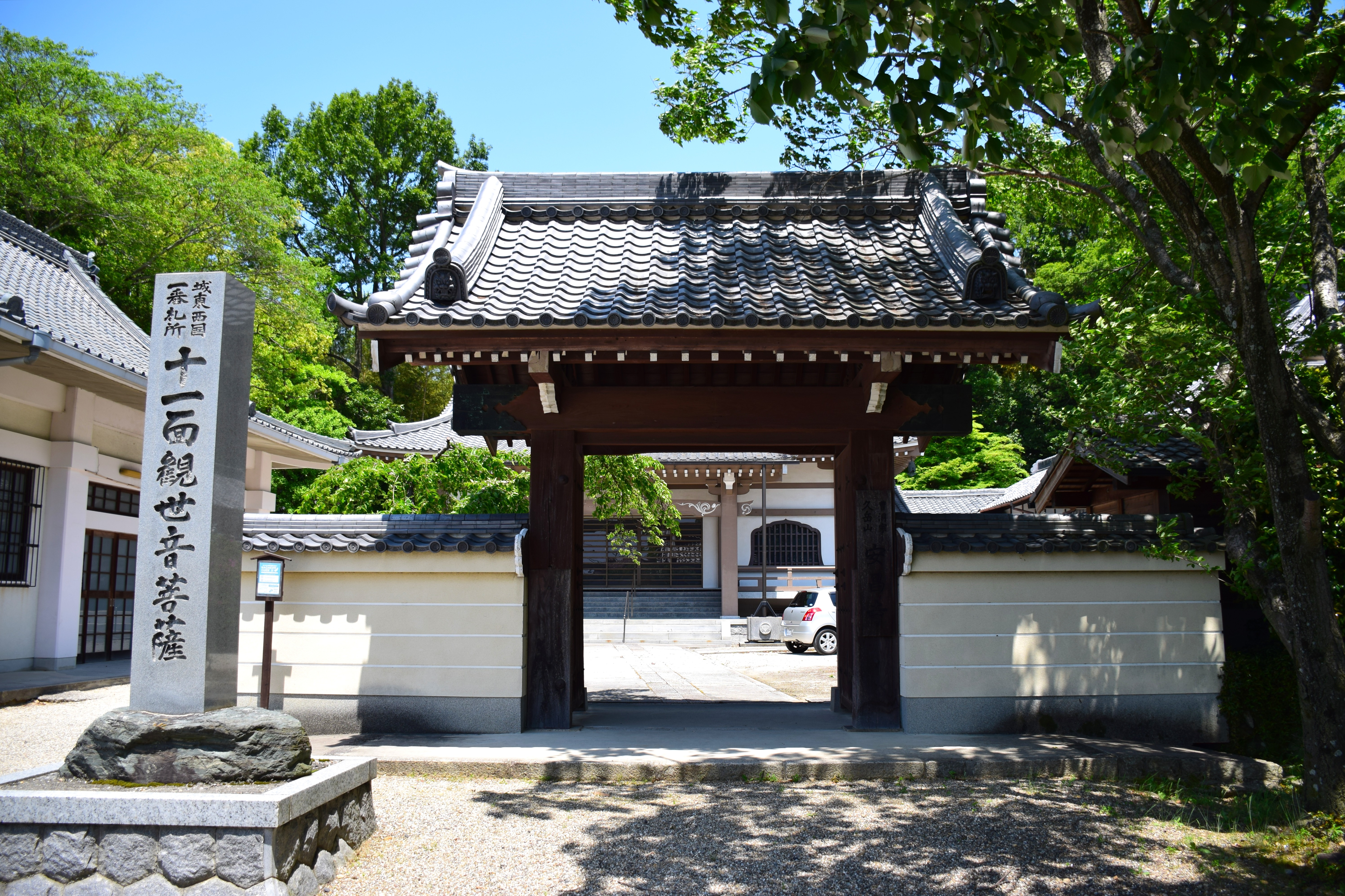 安昌寺山門